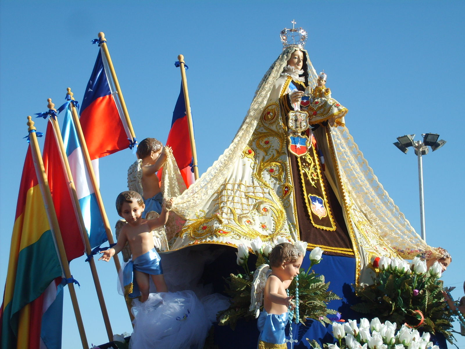 "La Chinita" - Virgen del Carmen de La Tirana. Procesión 16 de Julio de 2008.